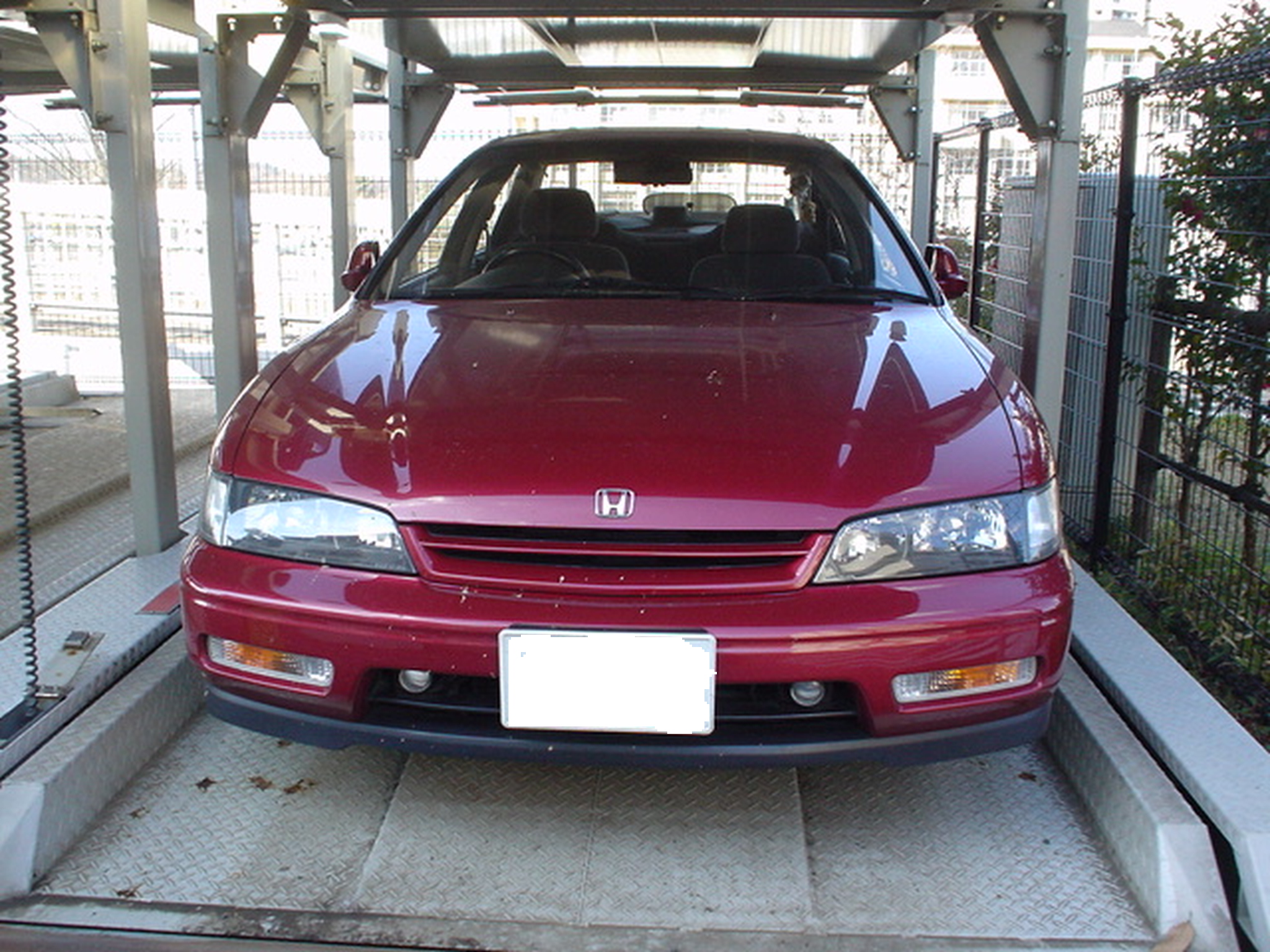 ホンダ・アコードSiR